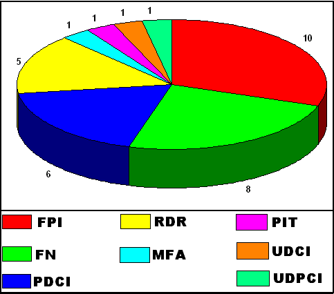 œuvre personnelle